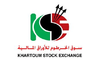 شعار سوق الخرطوم للأوراق المالية